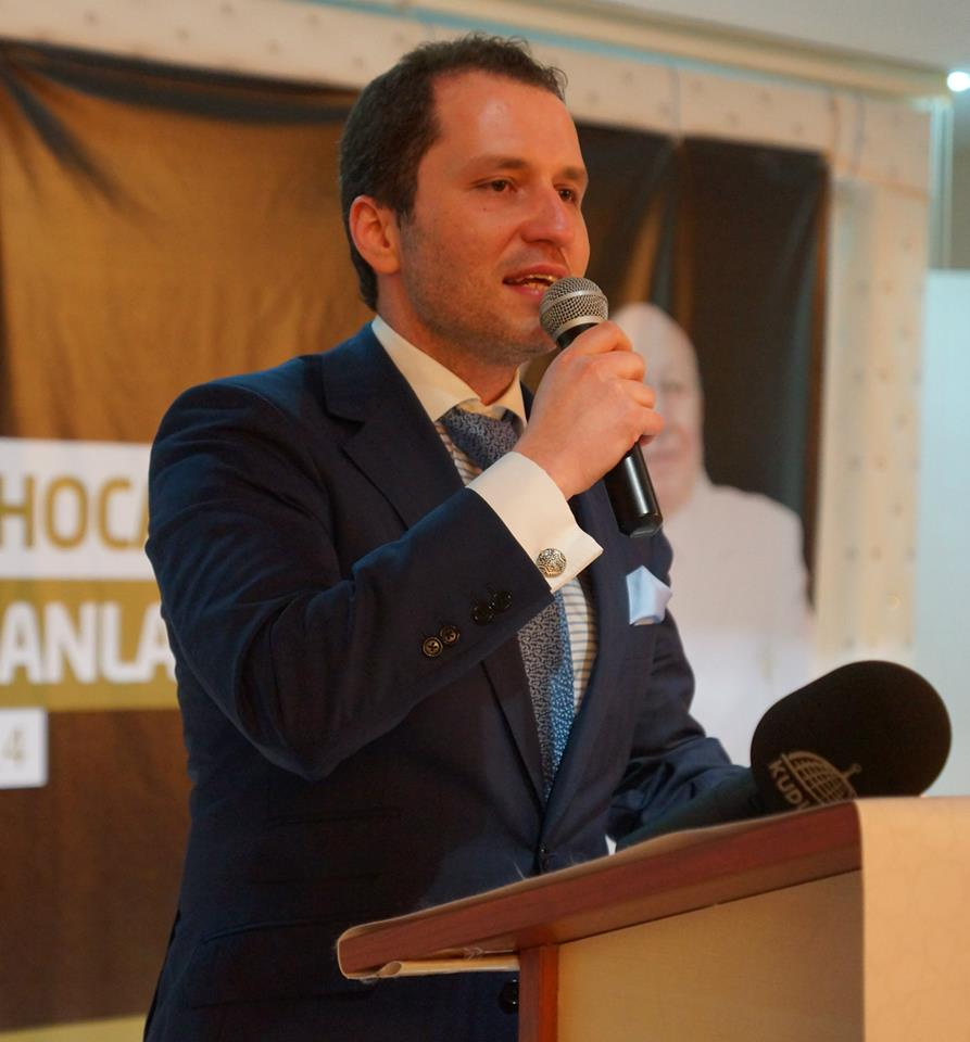 Dr. Muhammed Ali Fatih Erbakan